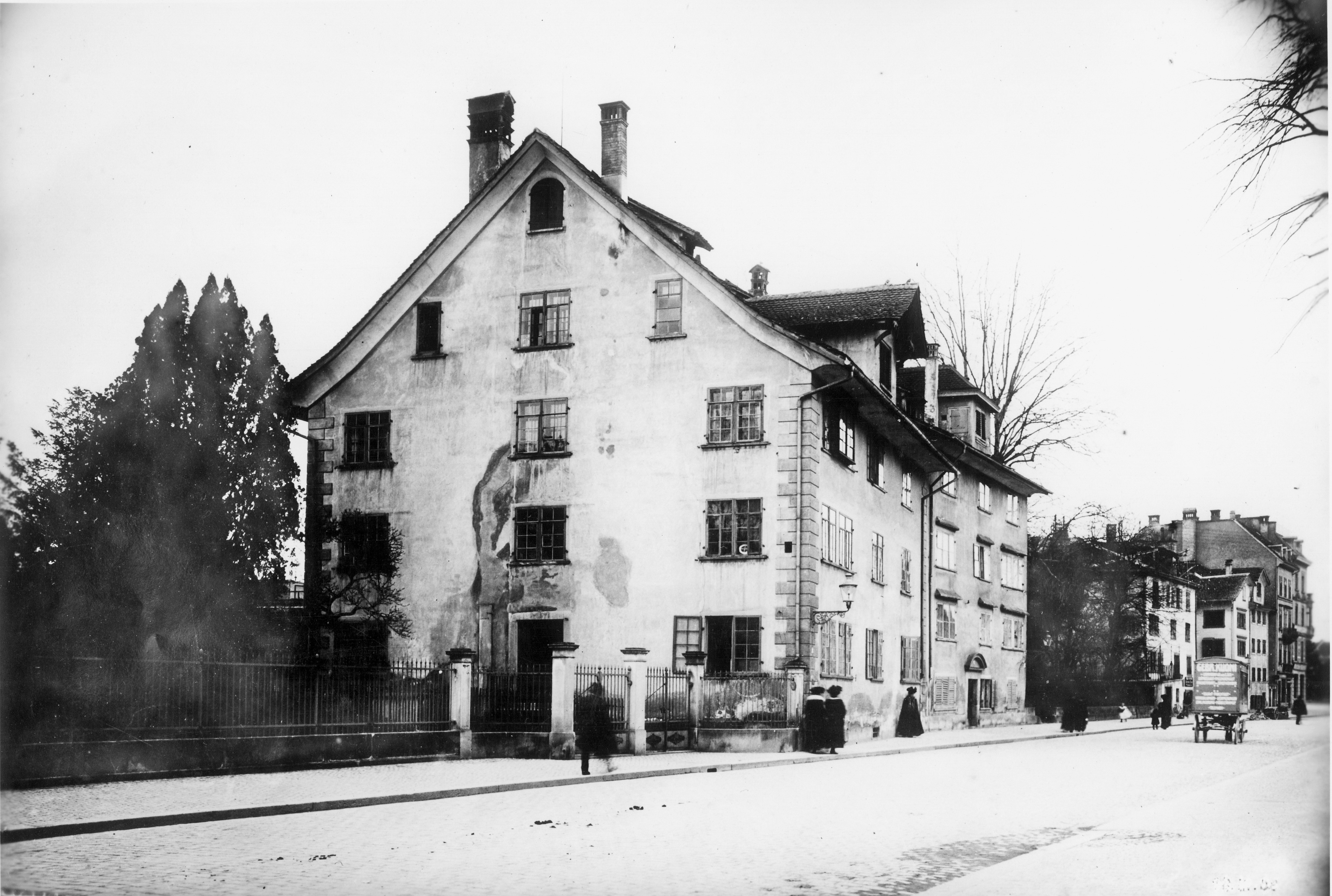 Glockenhaus, Sihlstr. 35 und 37, Zürich, Schweiz: Areal der Glockengiesserei Füssli (Ende 15. Jhr. gegründet) mit Glockenhaus und umliegenden Gebäuden. Giesserei wurde 1843 geschlossen und 1864, der Glockenhof 1909 abgerissen. Das Areal wurde 1856 an Hans Caspar Escher (Gründer der Maschinenfabrik Escher Wyss & Co.) verkauft, der im angrenzenden Felsenhof wohnt.